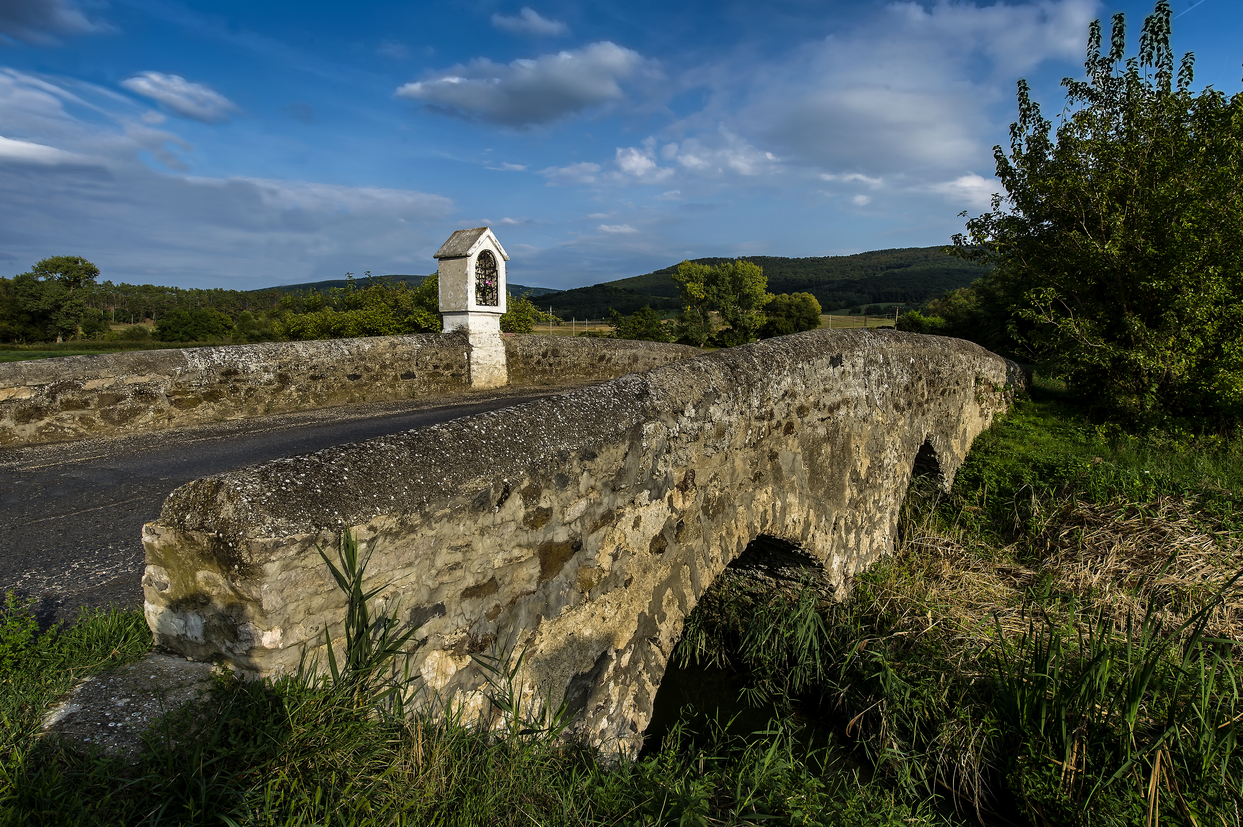 Kőhíd (csatorna). 19. sz. eleje. -Hegyesd, Petőfi Sándor u. This is a photo of a monument in Hungary. Identifier: 9890